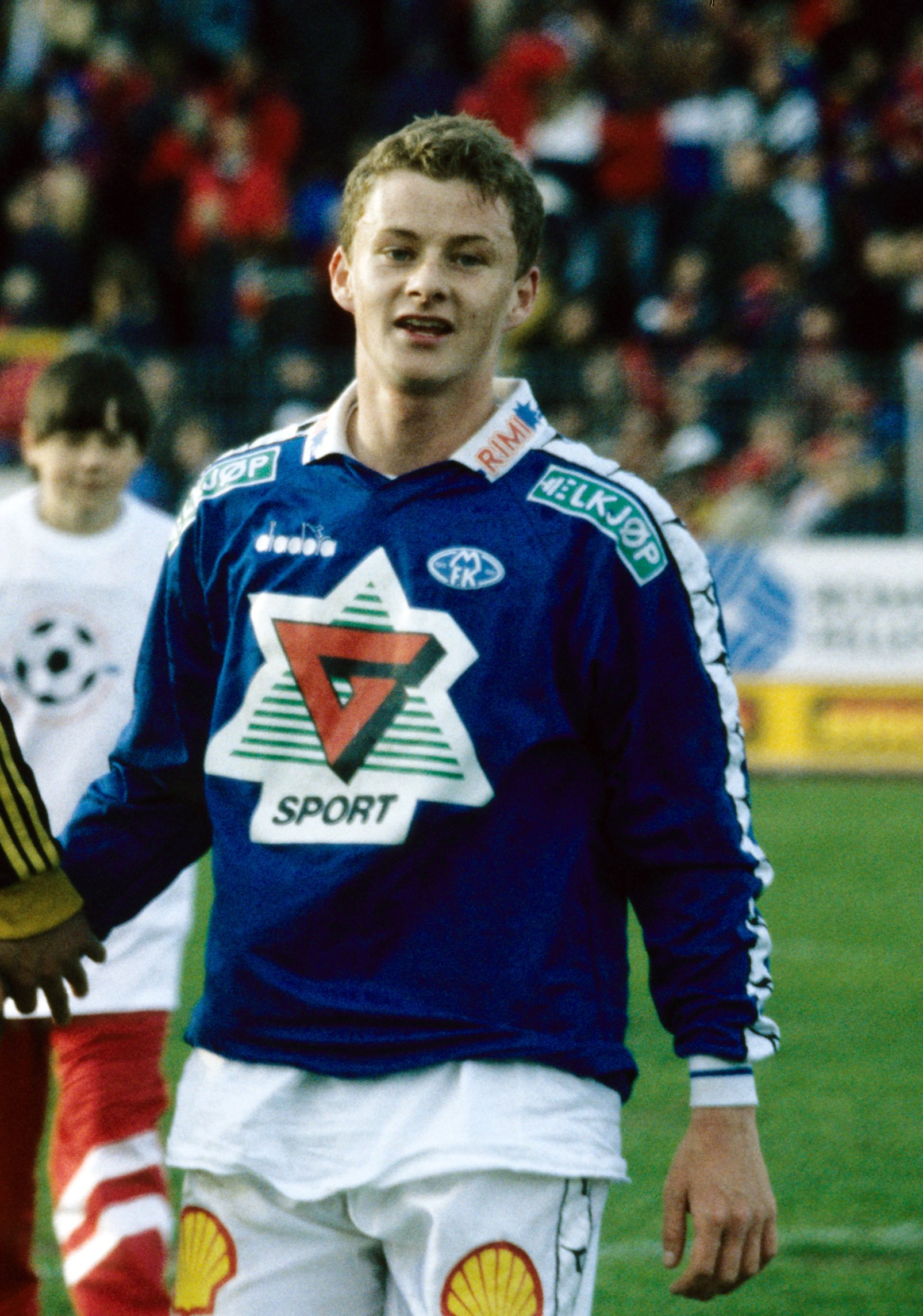 Ole Gunnar Solskjær som Molde-spiller